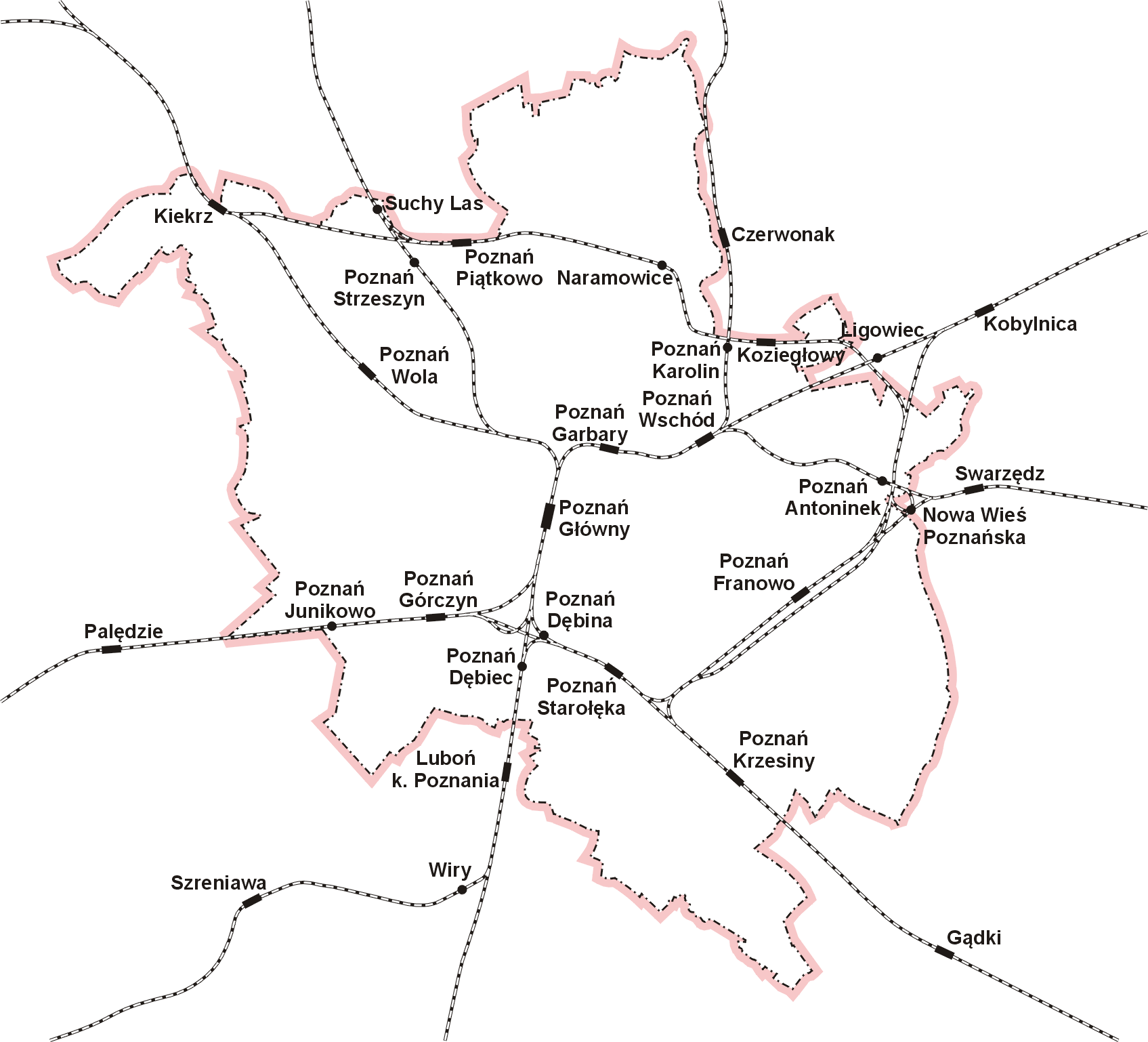 Poznański Węzeł Kolejowy.